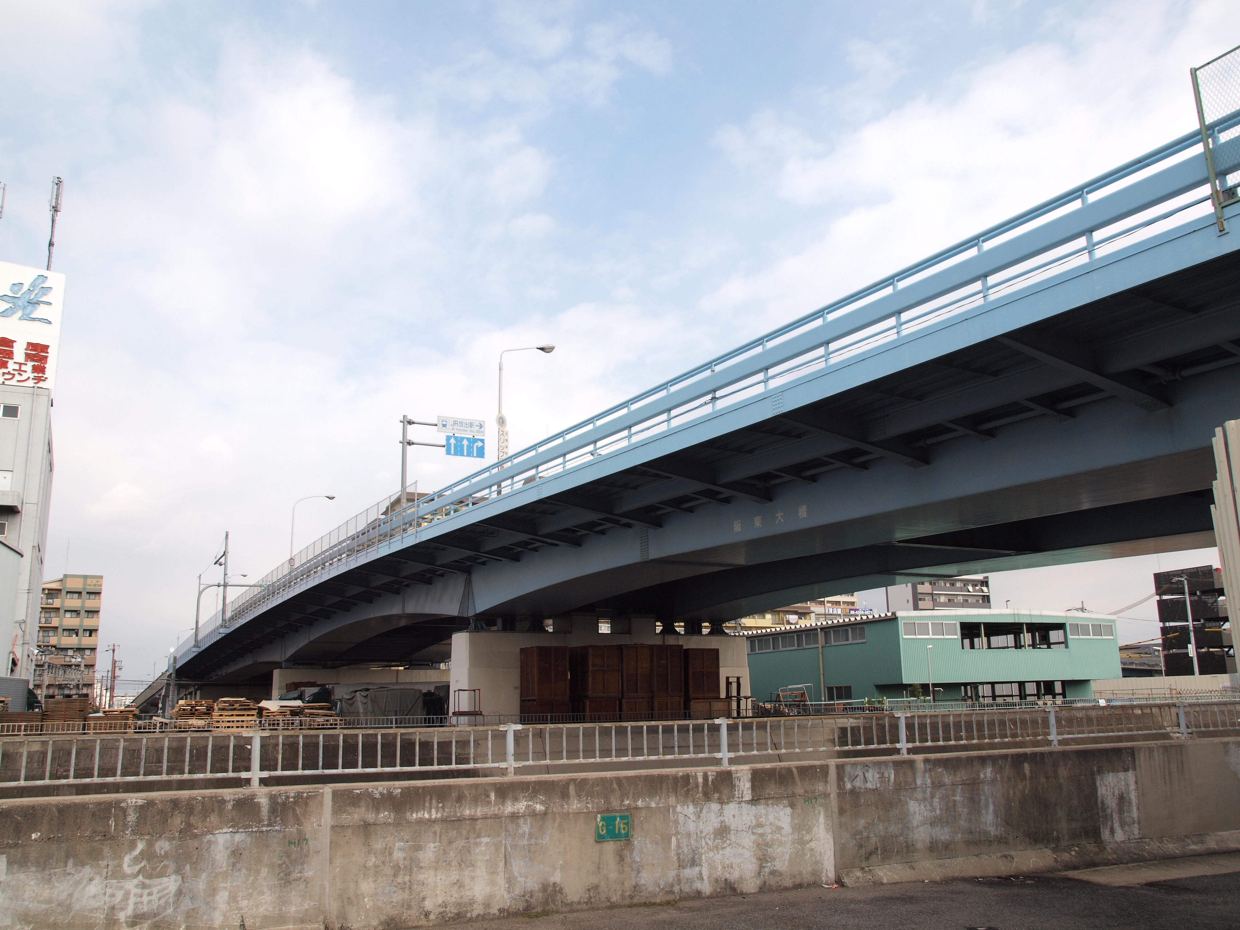 阪東大橋（大阪市鶴見区-城東区） 2008年12月撮影。 機材：E-30 撮影者：Kansai explorer